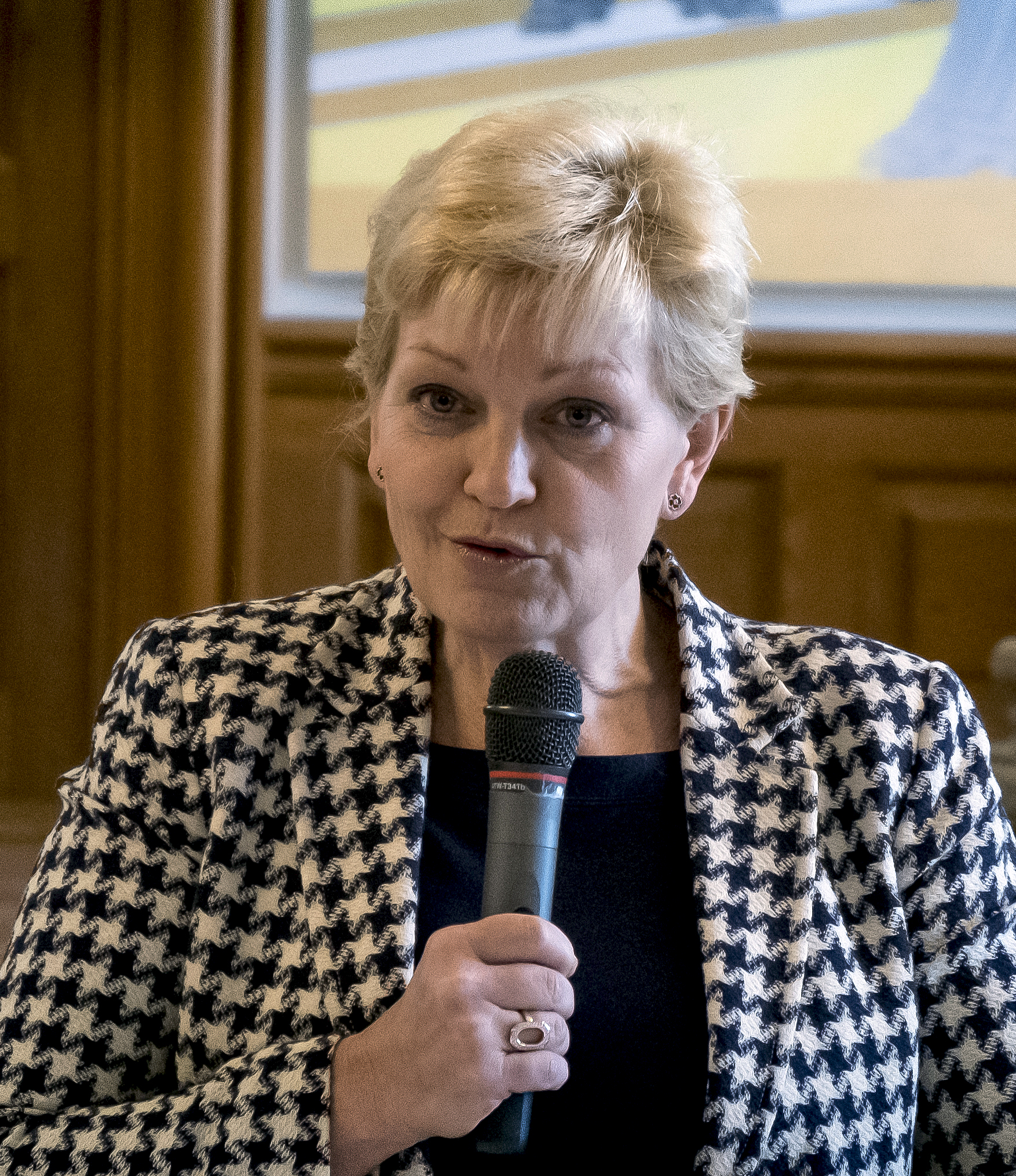 Eva Kjer Hansen, Danmarks minister for fiskeri og ligestilling og nordisk samarbejde, talar vid en konferens i Fællessalen i Folketinger 20181204 med folketingsledamoten Bertel Haarder som värd och med Greater Copenhagen Committee och ØresundDirekt som arrangörer med stöd av Nordiska Ministerrådet och Sveriges ambassad i Köpenhamn. Moderator Johan Wessman. Photo: News Øresund Thea Wiborg © News Øresund Thea Wiborg (CC BY 3.0). Detta verk av News Øresund är licensierat under en Creative Commons Erkännande 3.0 Unported-licens (CC BY 3.0). Bilden får fritt publiceras under förutsättning att källa anges. .The picture can be used freely under the prerequisite that the source is given. News Øresund, Malmö, Sweden.News Øresund är en oberoende regional nyhetsbyrå som är en del av det oberoende dansk-svenska kunskapscentrat Øresundsinstituttet.